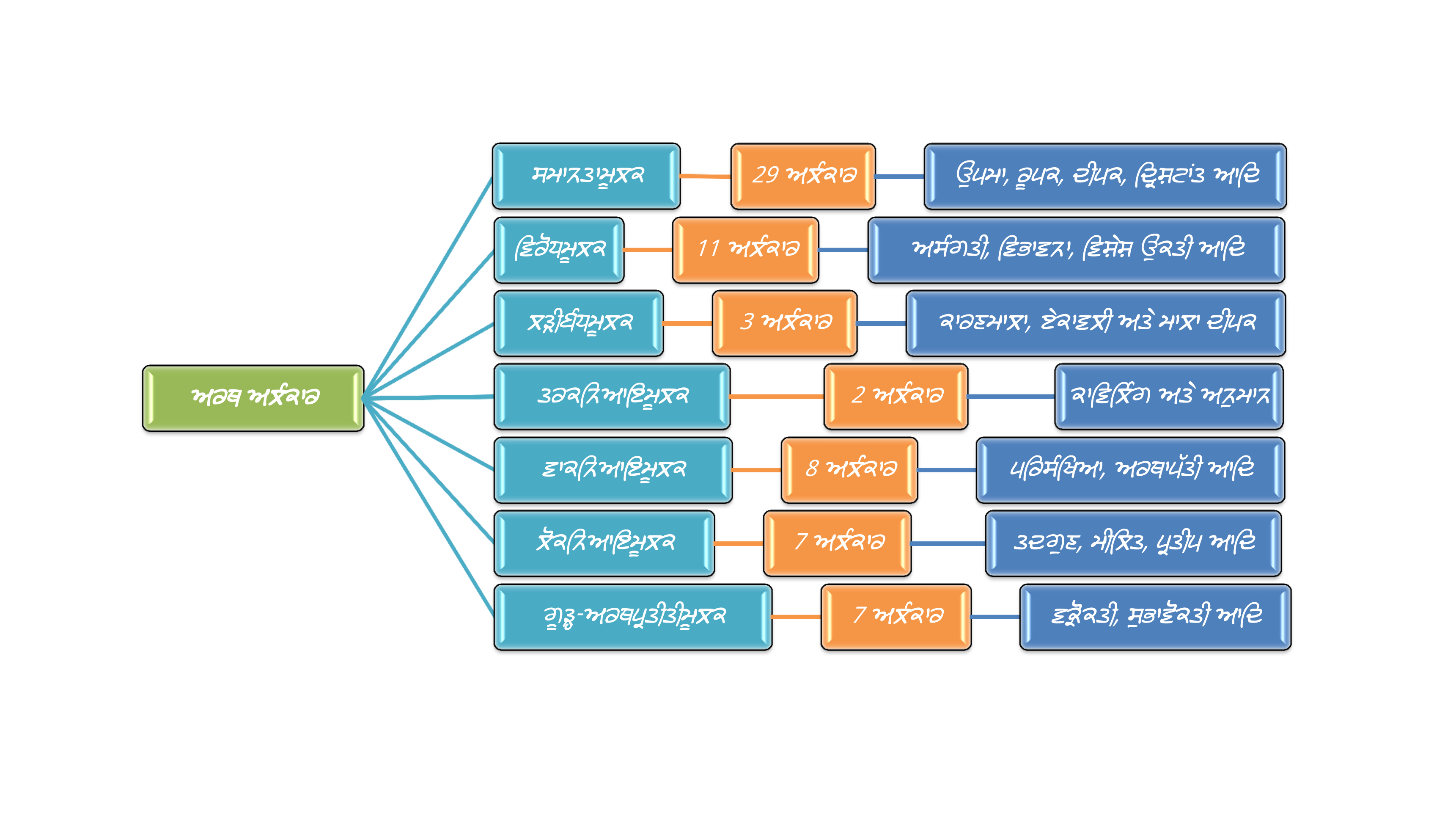 ਪੰਜਾਬੀ: ਇਹ ਤਸਵੀਰ/ਚਾਰਟ ਅਰਥ ਅਲੰਕਾਰ ਦੀਆਂ ਕਿਸਮਾਂ ਨੂੰ ਦਰਸਾਉਂਦਾ ਹੈ।